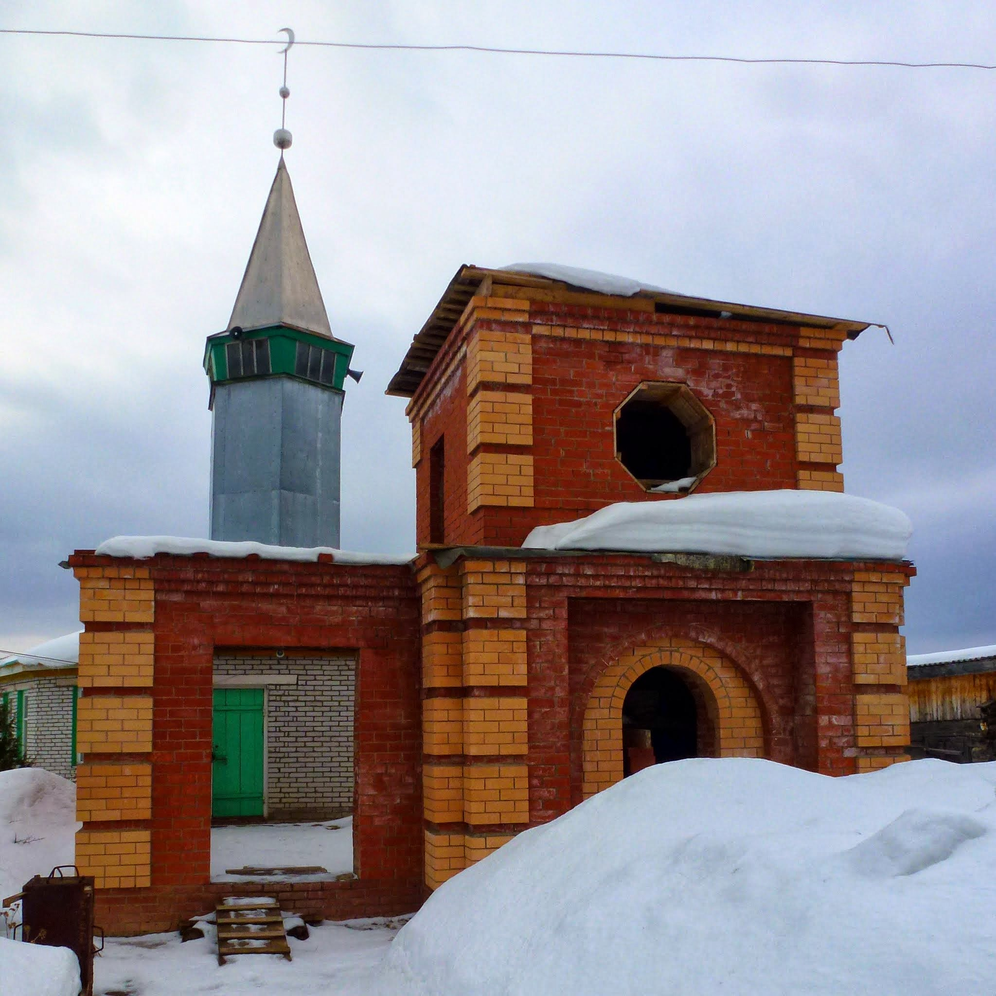 Мечеть, Елпачиха, Пермский край